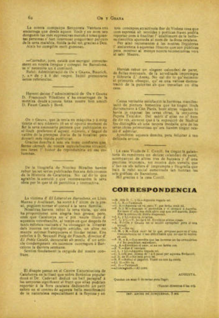 pàgina de correspondència d'or y grana